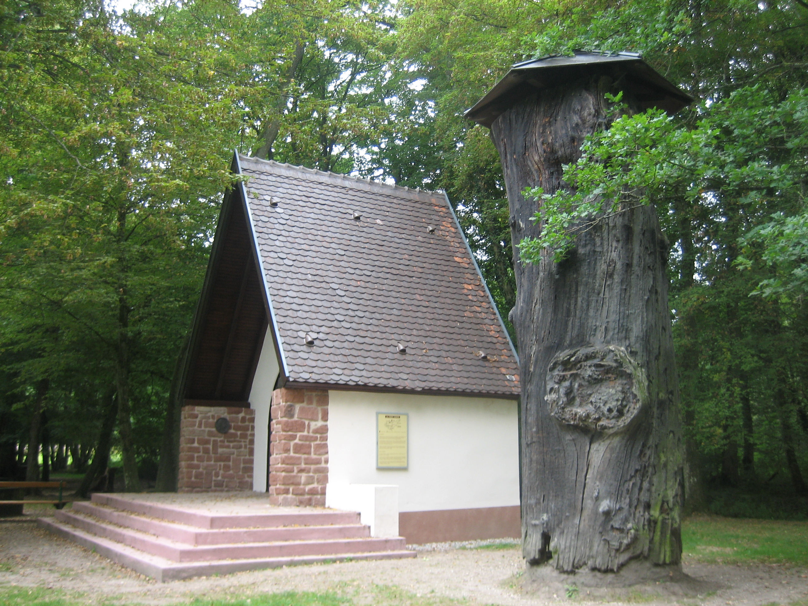 Gros chêne et la chapelle à Haguenau, France